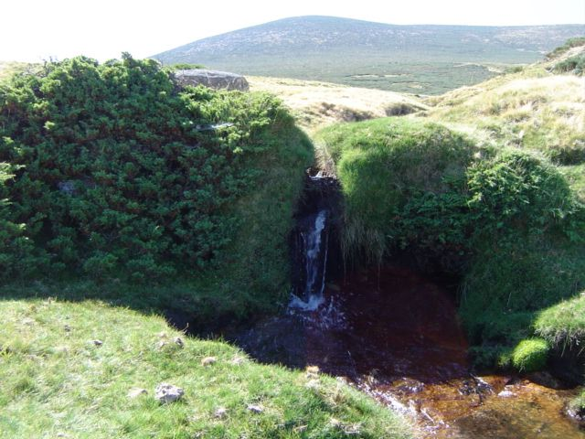 Juniperus communis subsp. alpina, La Serrota (Ávila) España